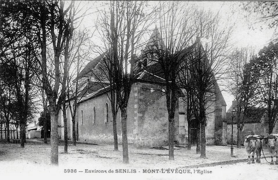 L'église Saint-Germain, avec le bas-côté nord et le portail.